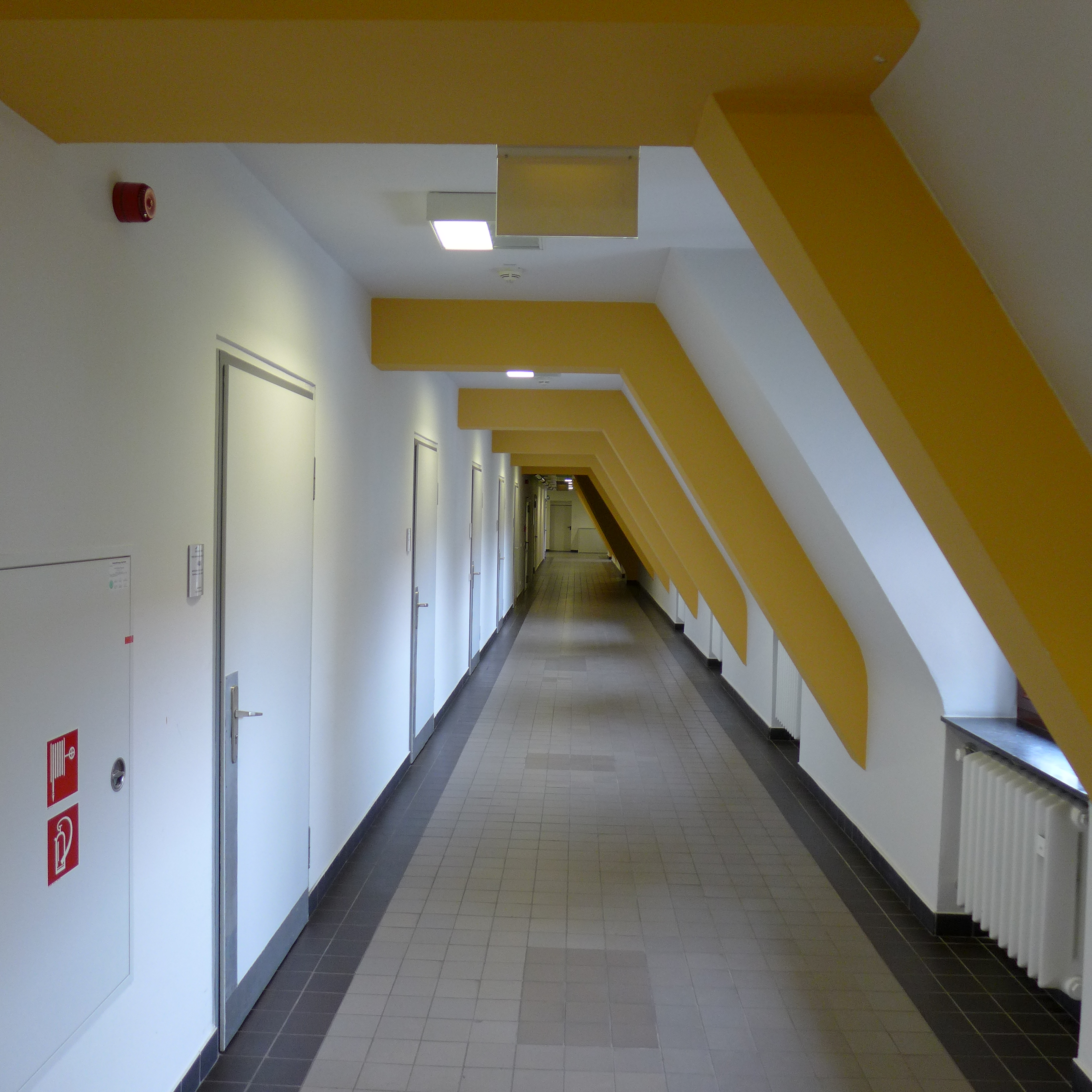 Rathaus St. Johann, Dachausbau der Wiederaufbauphase nach dem Zweiten Weltkrieg in Beton